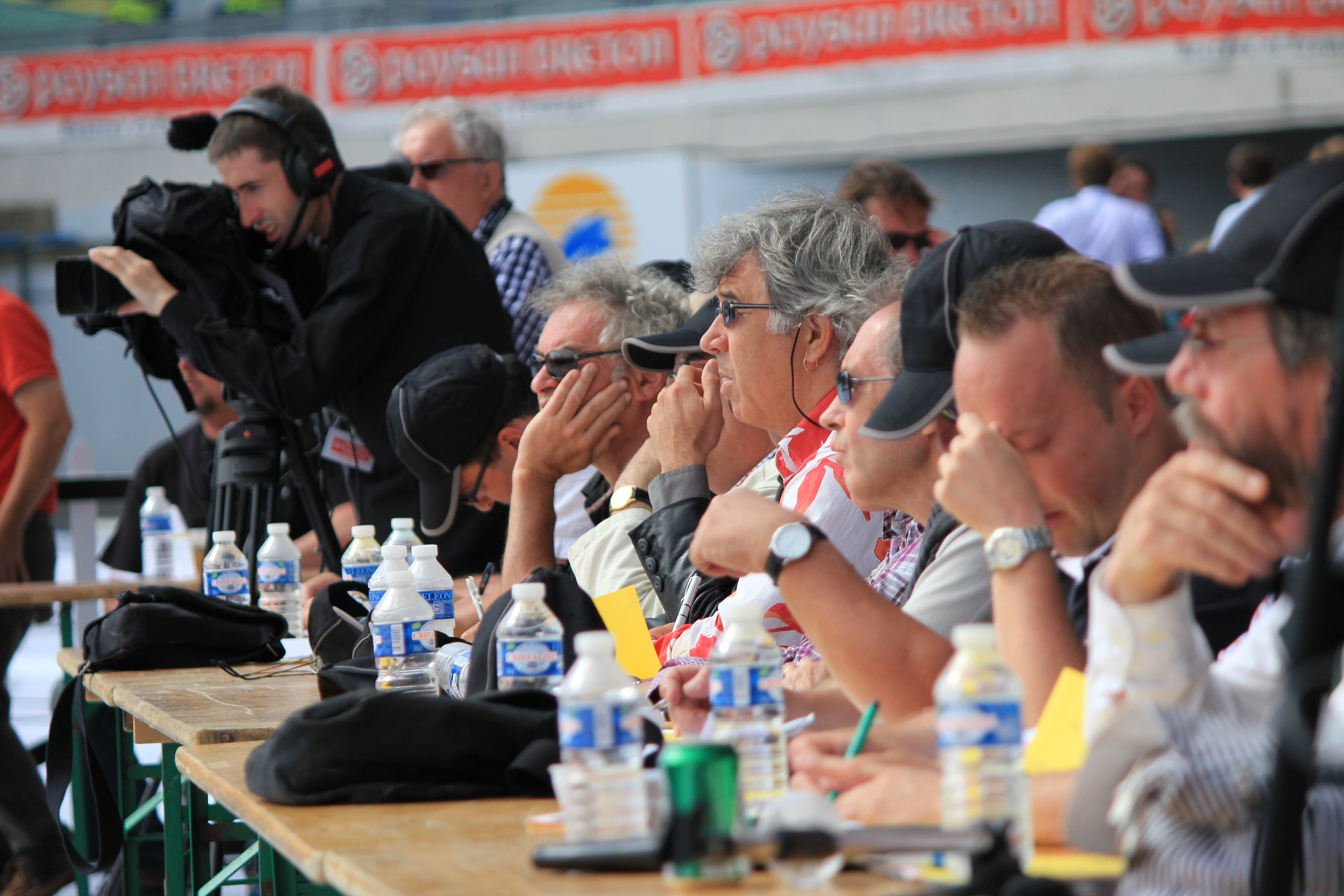 Jury de la BAS lors de l'épreuve d'été du championnat national de bagadoù de 1ère division, organisée au stade du Moustoir à Lorient.